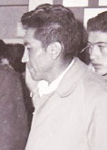 Víctor Zapana durante una exposición artística, la imagen fue recortada d ela imgaen en grupo